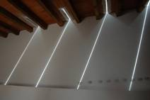 reloj negativo de sol en el cuarto cósmico